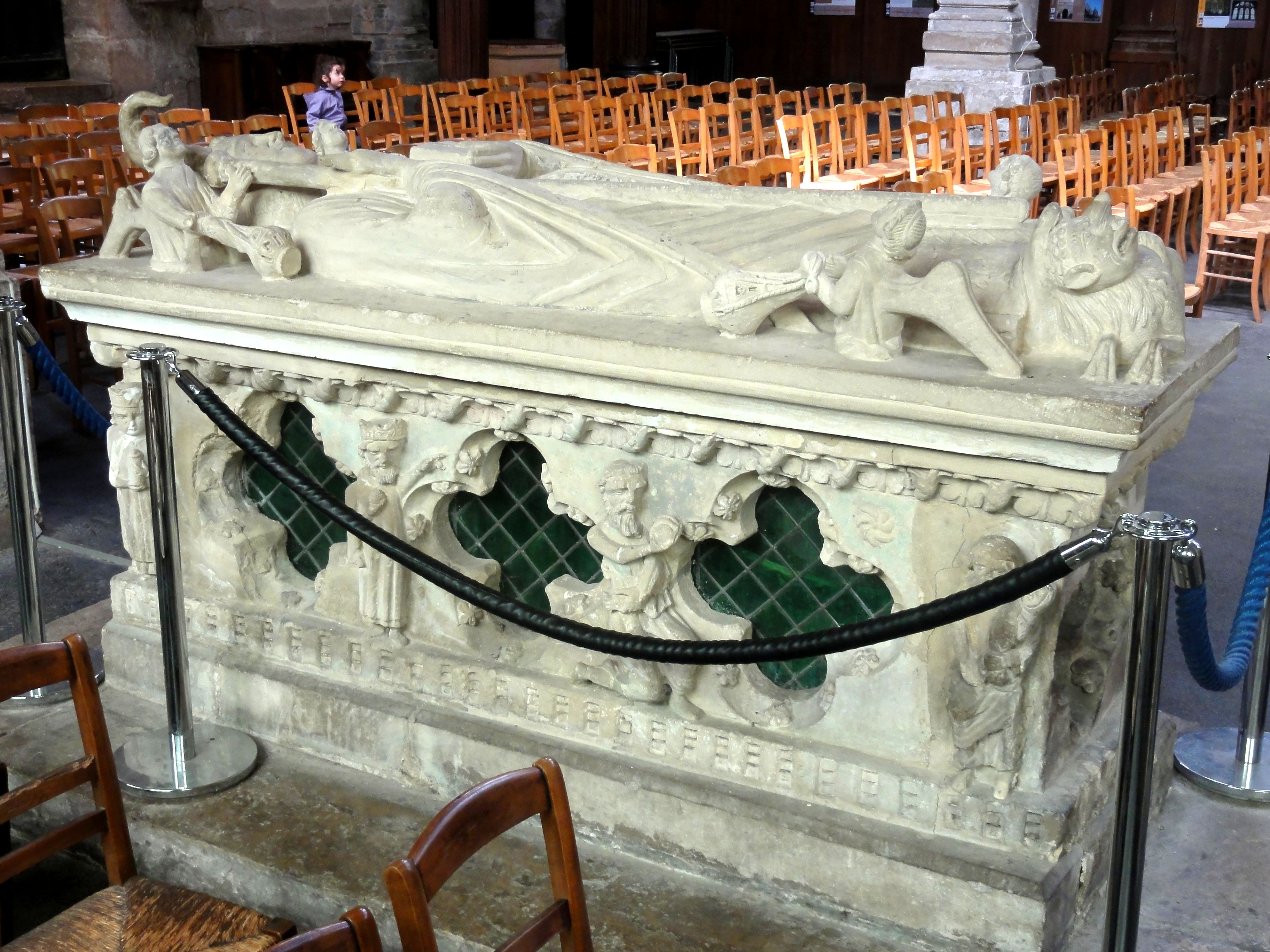 Tombeau de Saint Gautier.